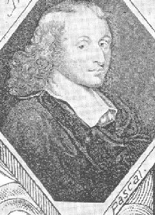 Blaise Pascal. Oude afbeelding.